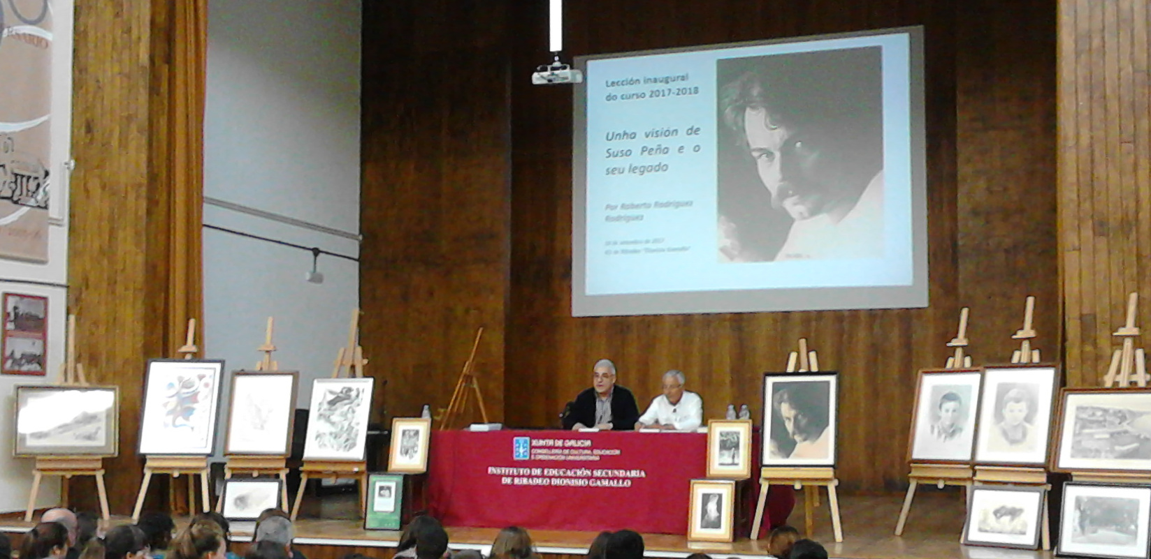 Conferencia de Roberto Rodríguez Rodríguez sobre Suso Peña, como acto de apertura do curso escolar 2017/2018 no IES de Ribadeo Dionisio Gamallo